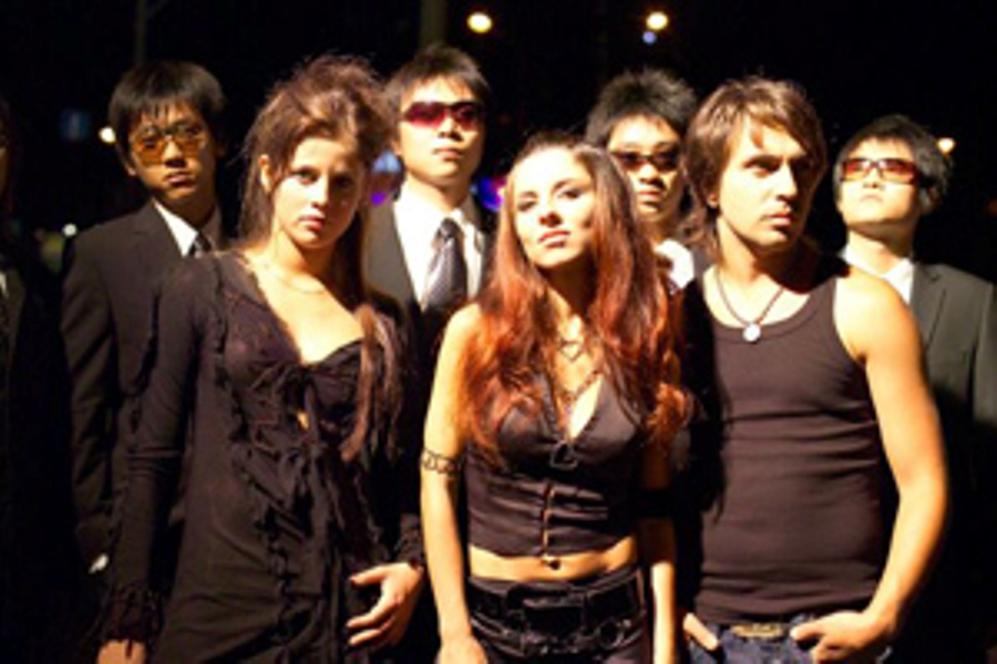 Uheggf съёмках клипа Vfvf vbz